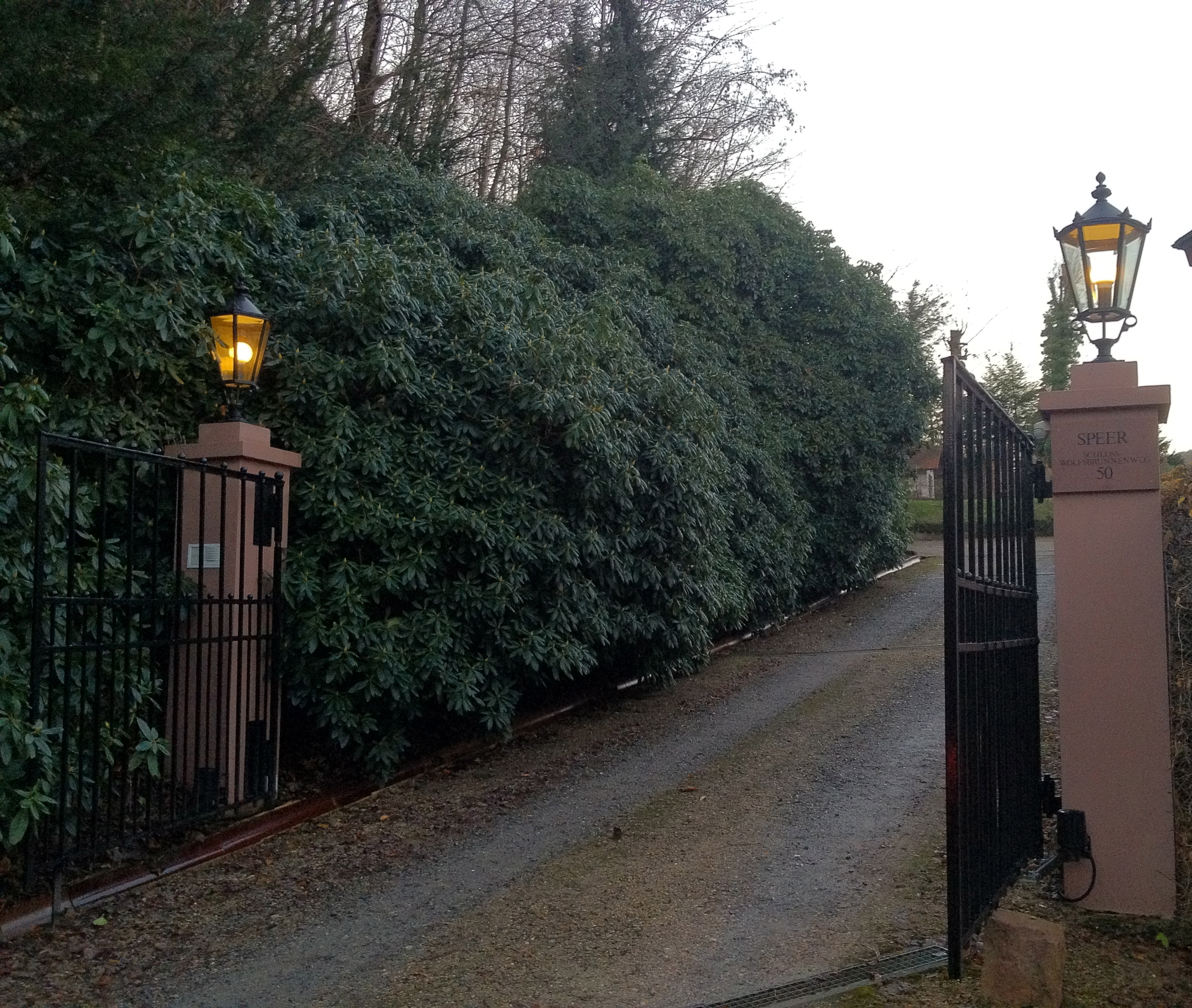 Entrance Villa Speer , Schloss Wolfsbrunnenweg 50 , Heidelberg , Germany